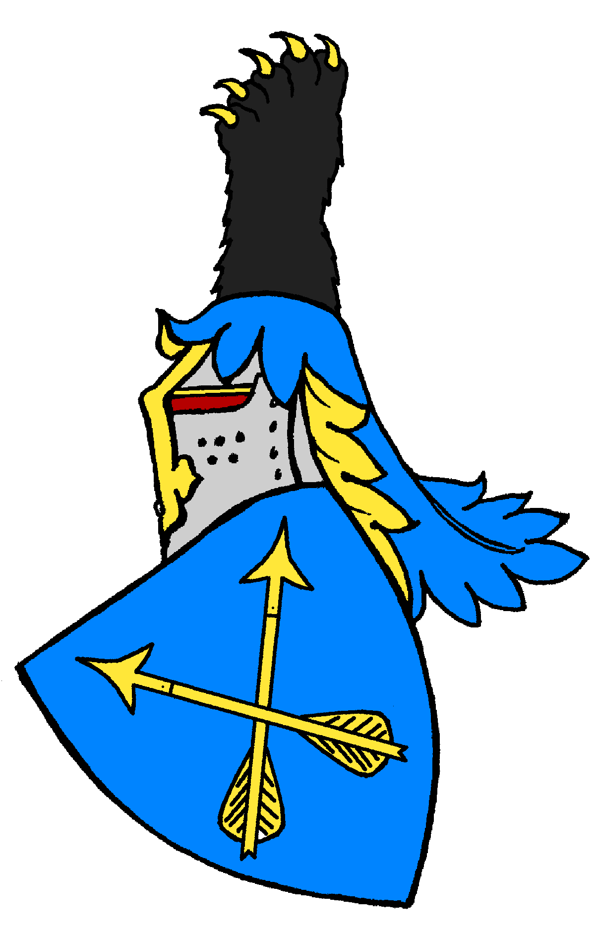 Wappen Sprecher von Bernegg